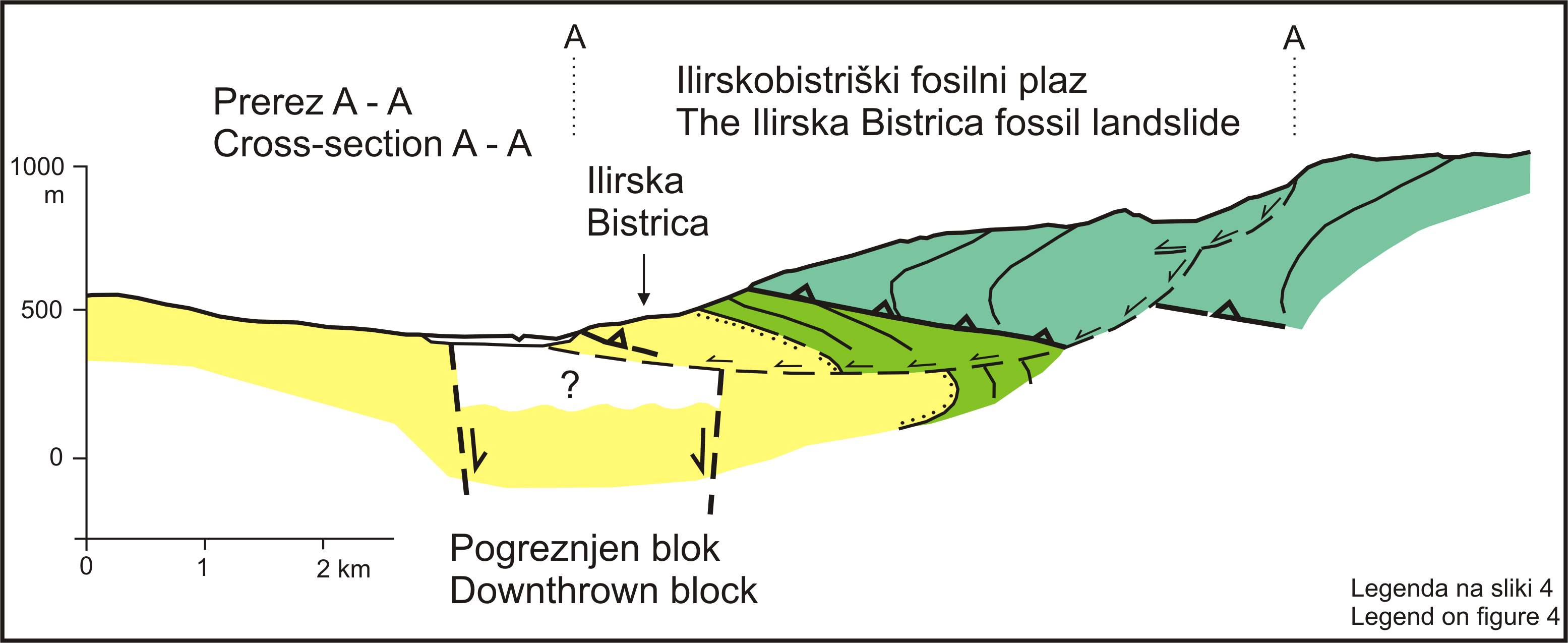 Ilirskobistriški fosilni plaz - podolžni prerez